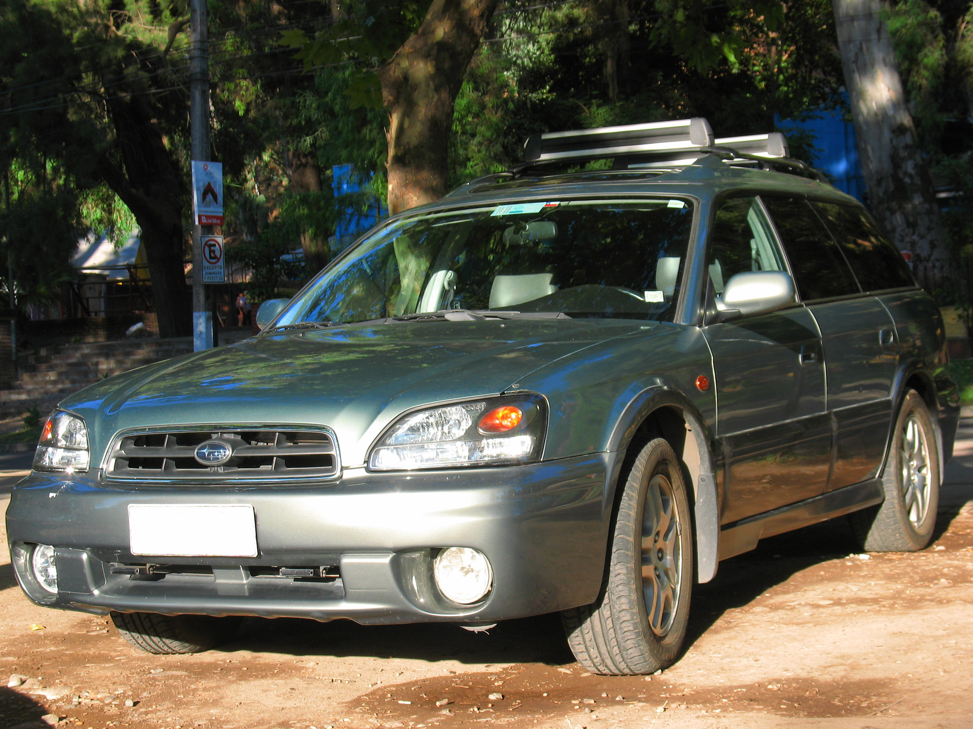 Subaru Legacy Outback 2.5 2002